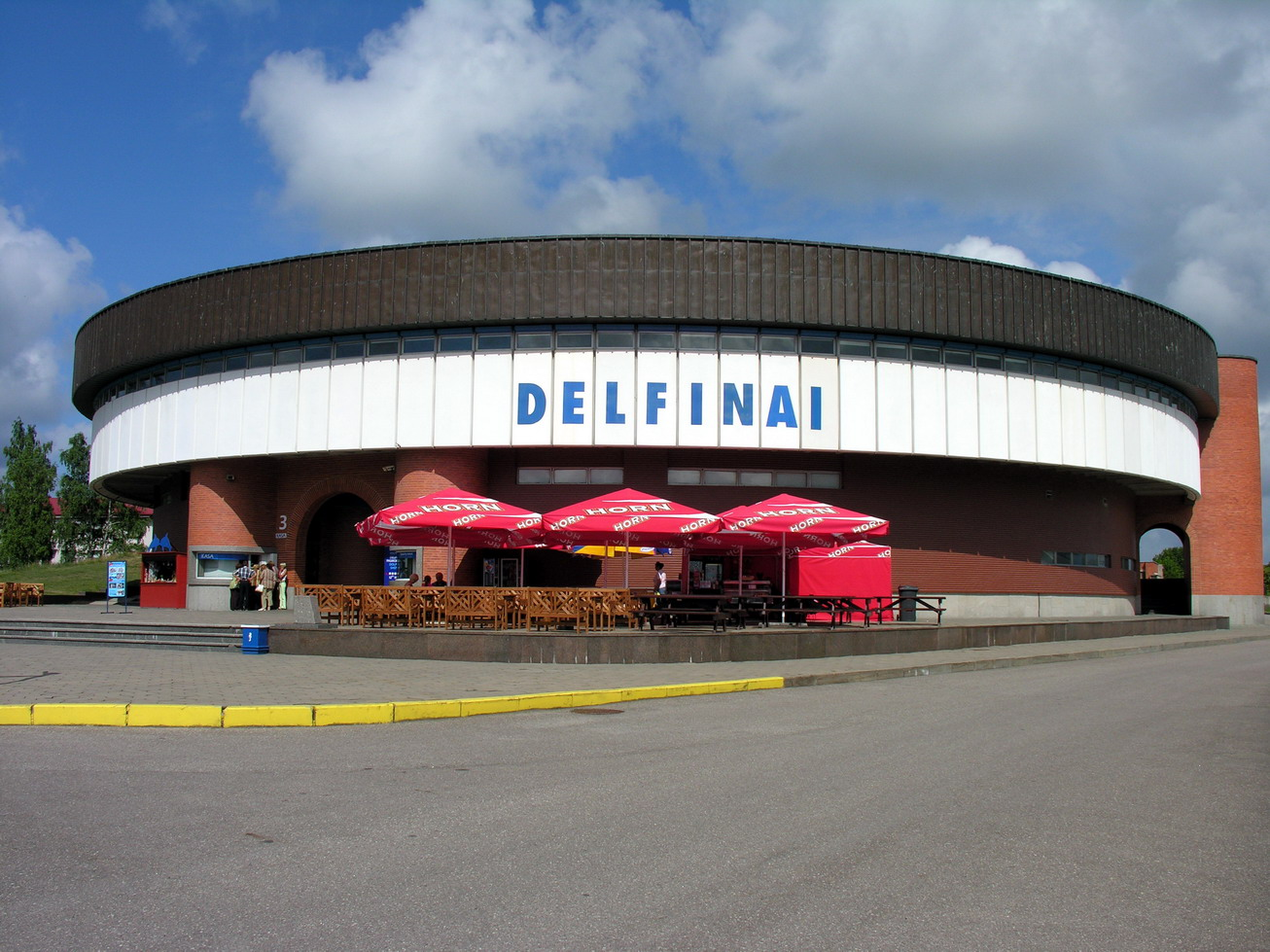 Lietuvos jūrų muziejus Foto: Algirdas, 2006 m. birželio 29 d.